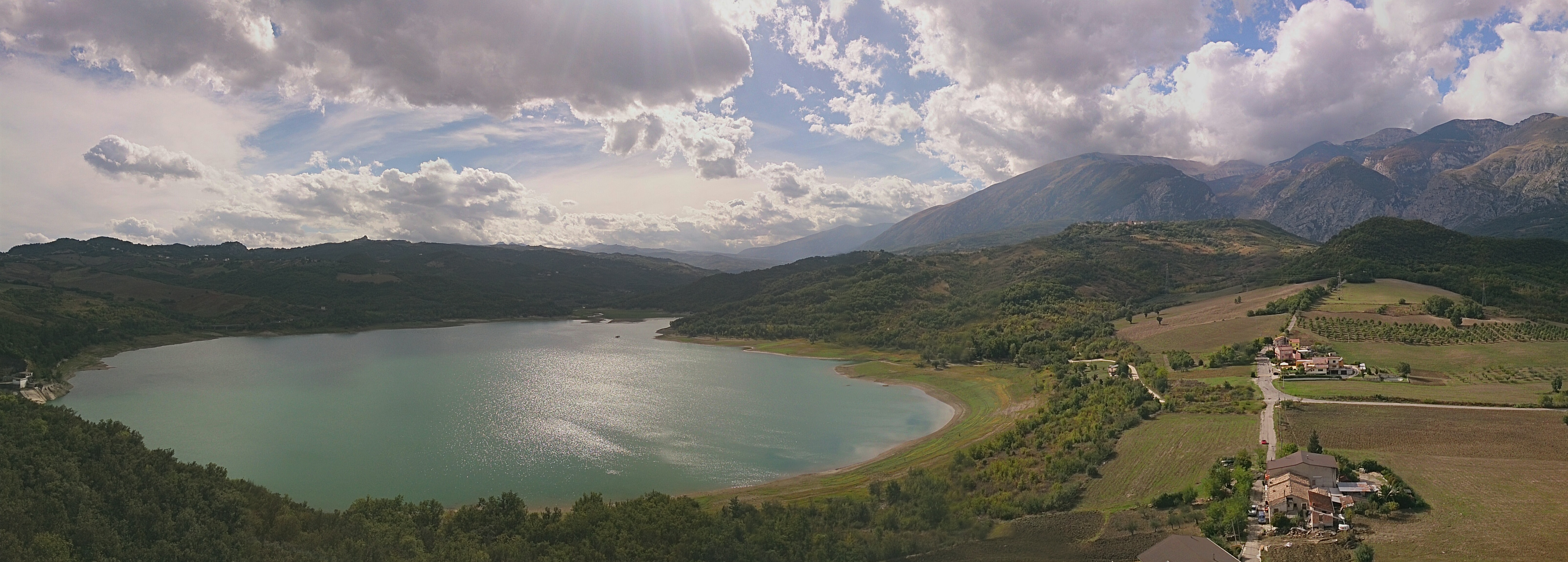 Vista del lago Sant'Angelo dalla Torre di Prata e del versante orientale della Majella all'inizio dell'autunno